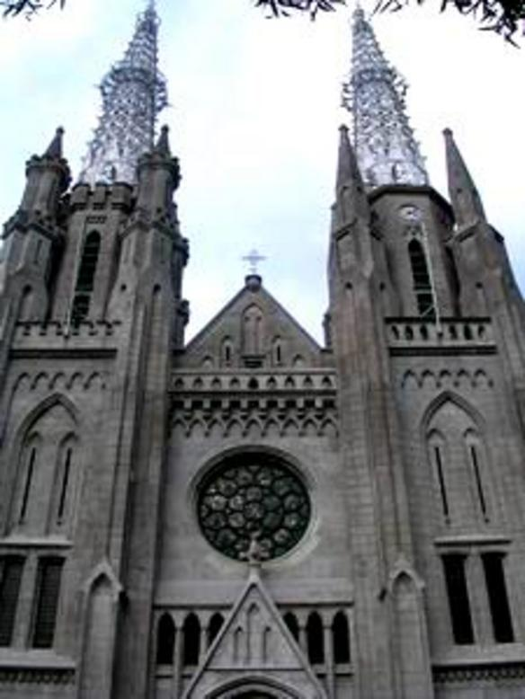 Jakarta cathedral